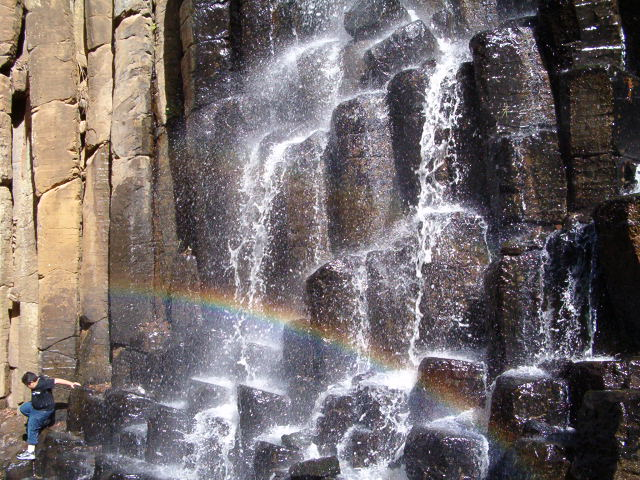 Prismas Basalticos, Hidalgo (México).